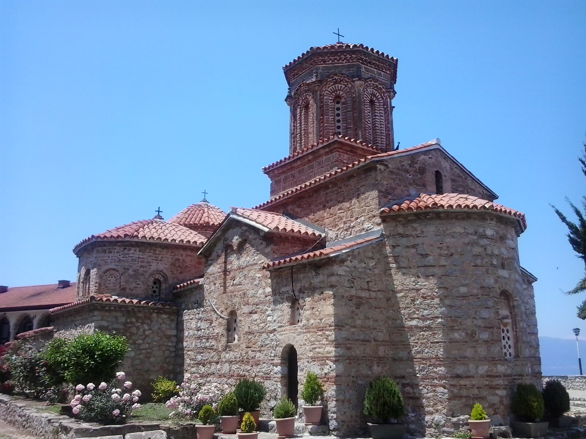 Manastir Sv. Naum